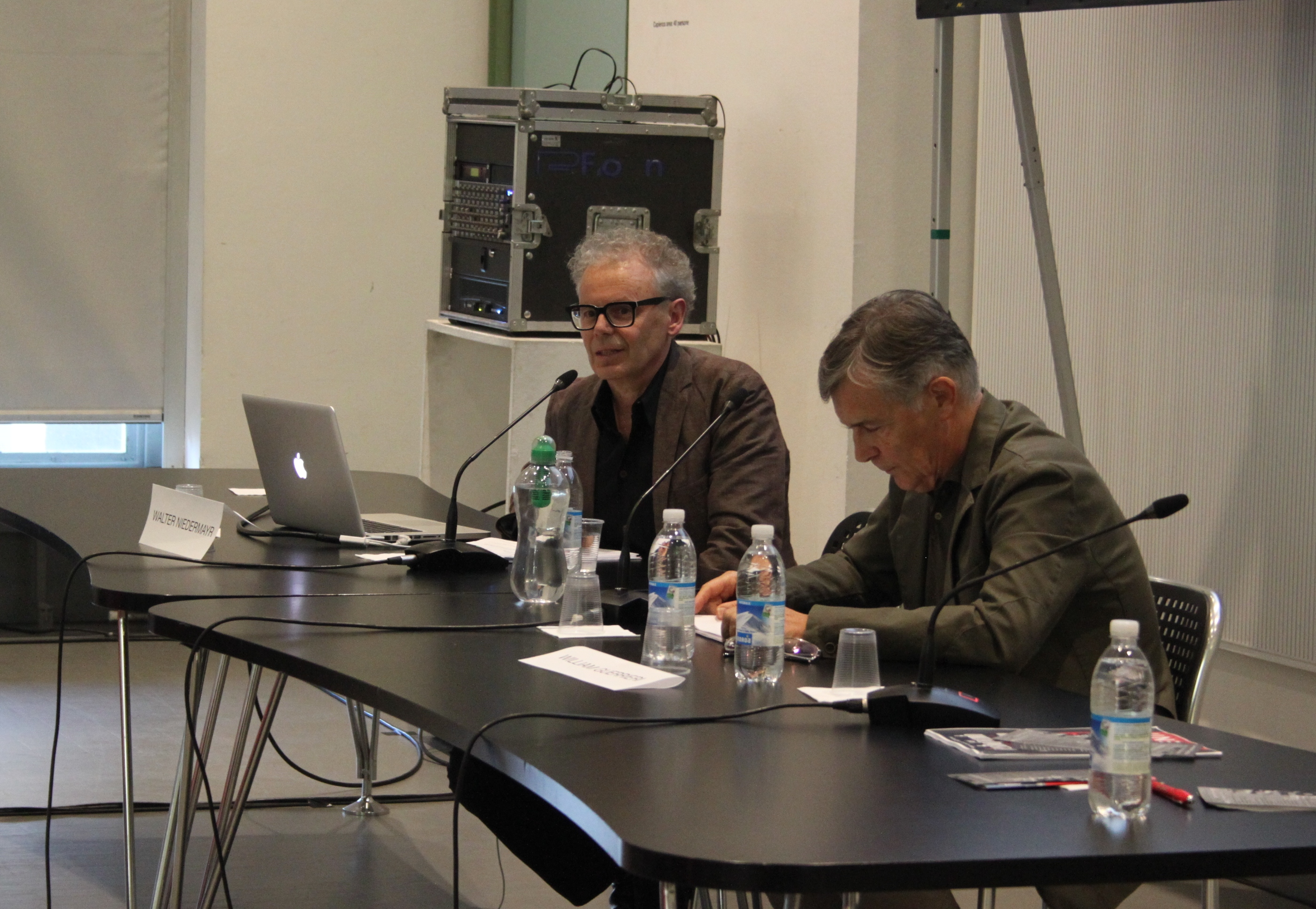 incontro con Walter Niedermayr, intervistato da William Guerrieri